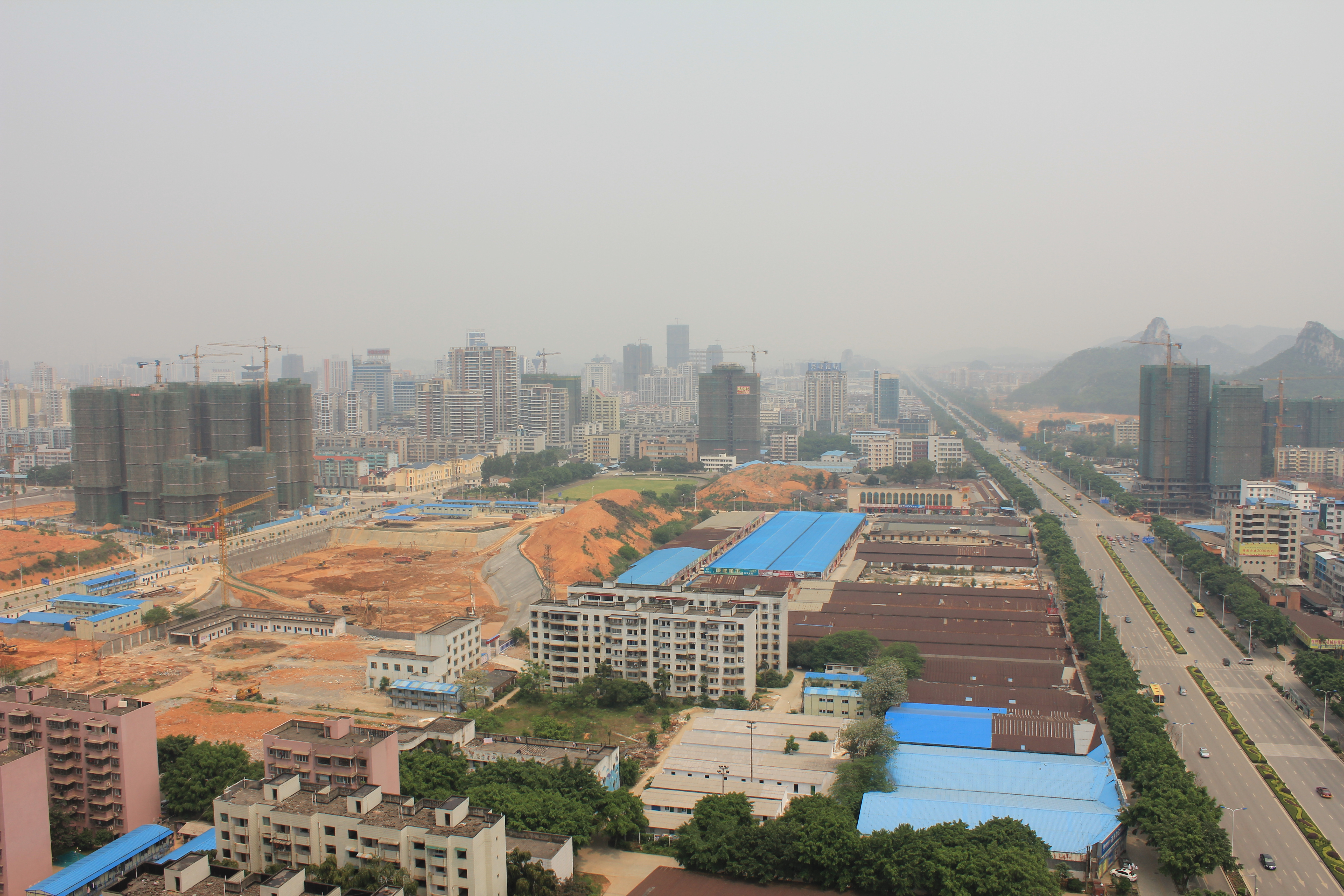 在建的柳州市新中央商务区东侧